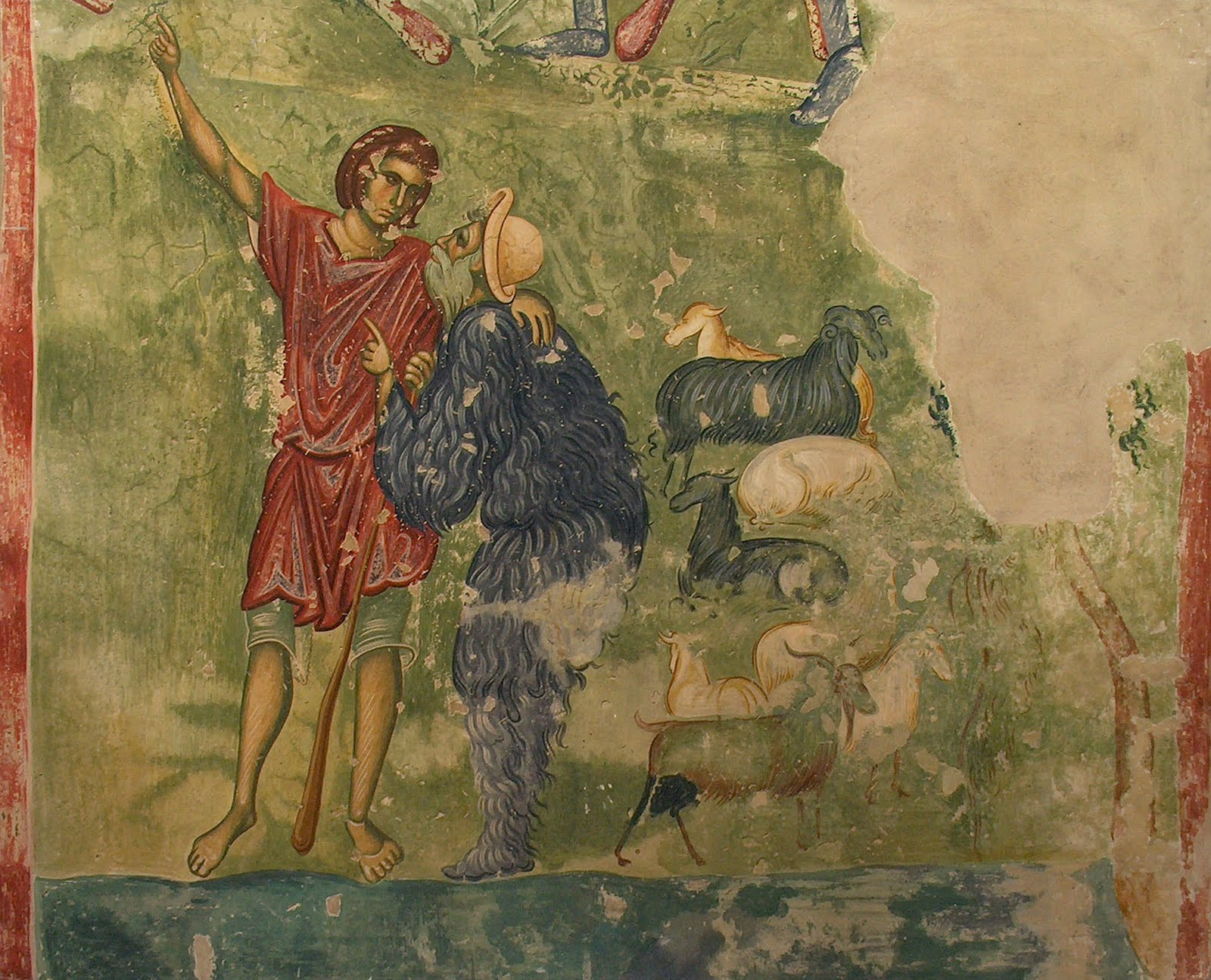 Pastiri, detalj sa freske iz manastira Sopoćani, 14. vek.